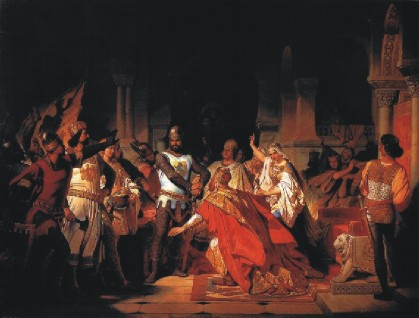 Kaiser Friedrich Barbarossa und Herzog Heinrich der Löwe in Chiavenna (1176), Maximilianeum München